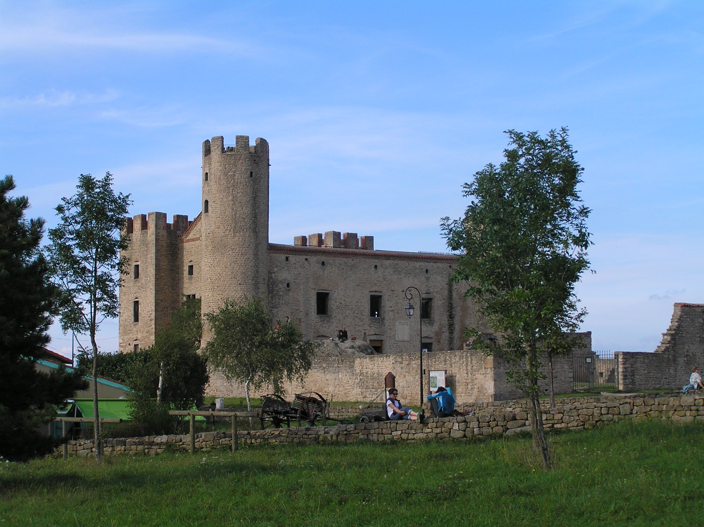 Le château d'Essalois (Loire)